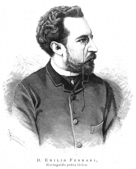 Emilio Ferrari, distinguido poeta lírico.